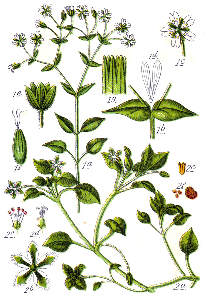 1. : Hain-Steinmiere, Stellaria nemorum subsp. nemorum, syn. Alsine nemorum (L.) Schreb. 2. : Gewöhnliche Vogelmiere, Stellaria media subsp. media, syn. Alsine media L. Original Caption 1. Hain-Miere, Alsine nemorum 2. Vogel-Miere, A. media